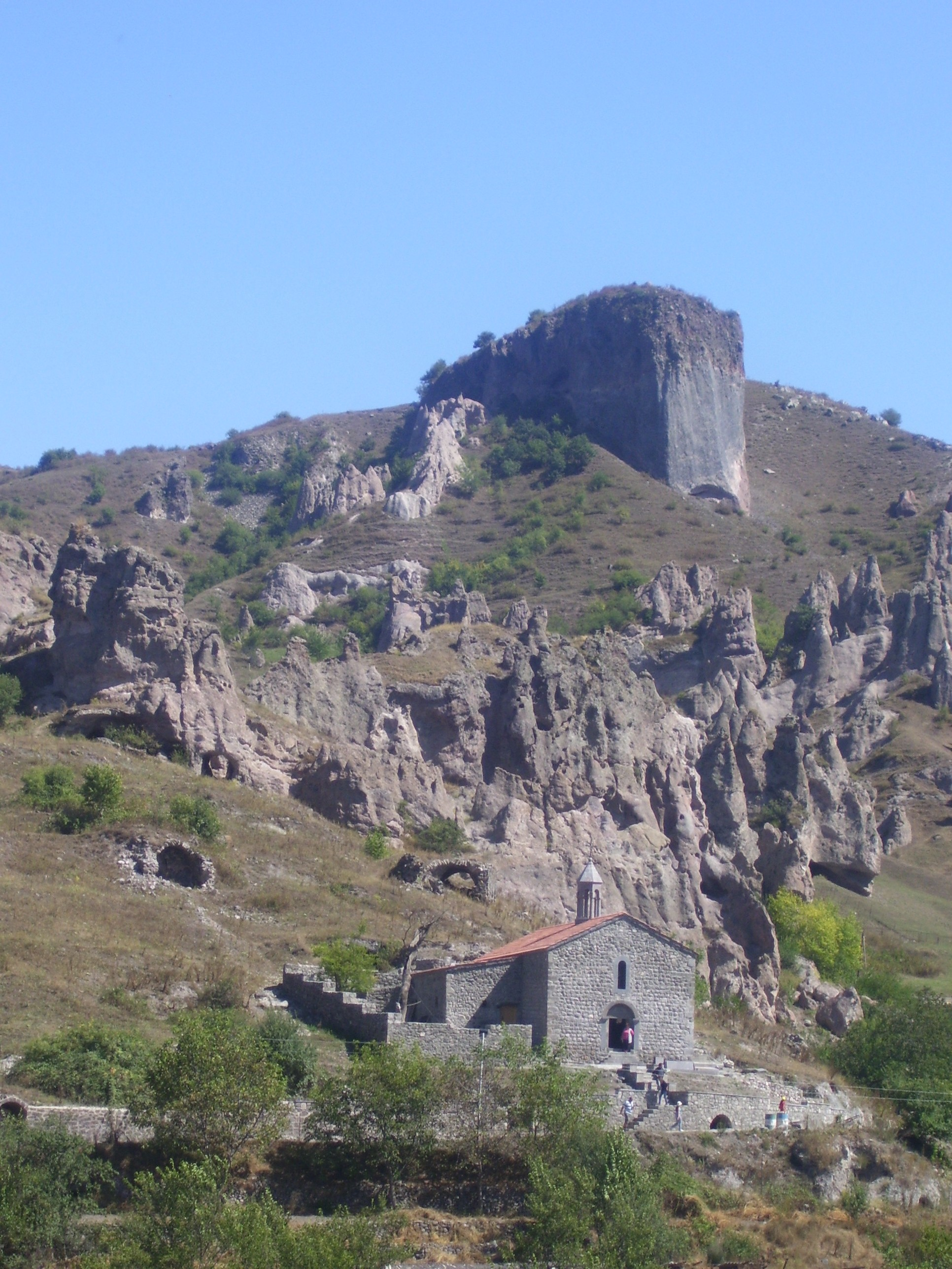 Գորիսի Սբ. Հռիփսիմե եկեղեցի, գյուղատեղիի հարավային մասում, բլրալանջին Արամի սարի ֆոնին։ 3/2.65